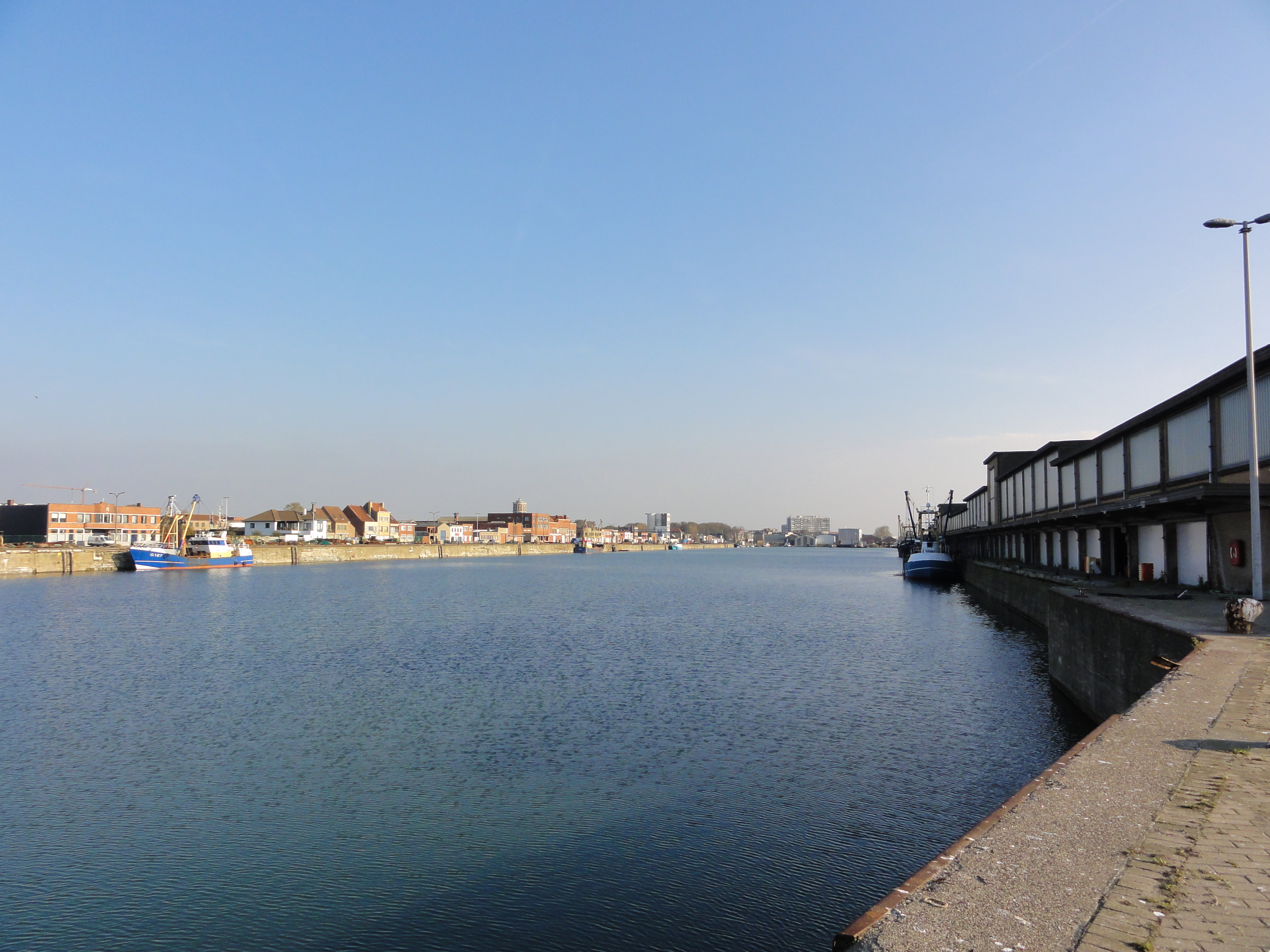 Visserijdok in de haven van Oostende. Visserijdok dock in the Port of Oostende. Oostende, West Flanders, Belgium